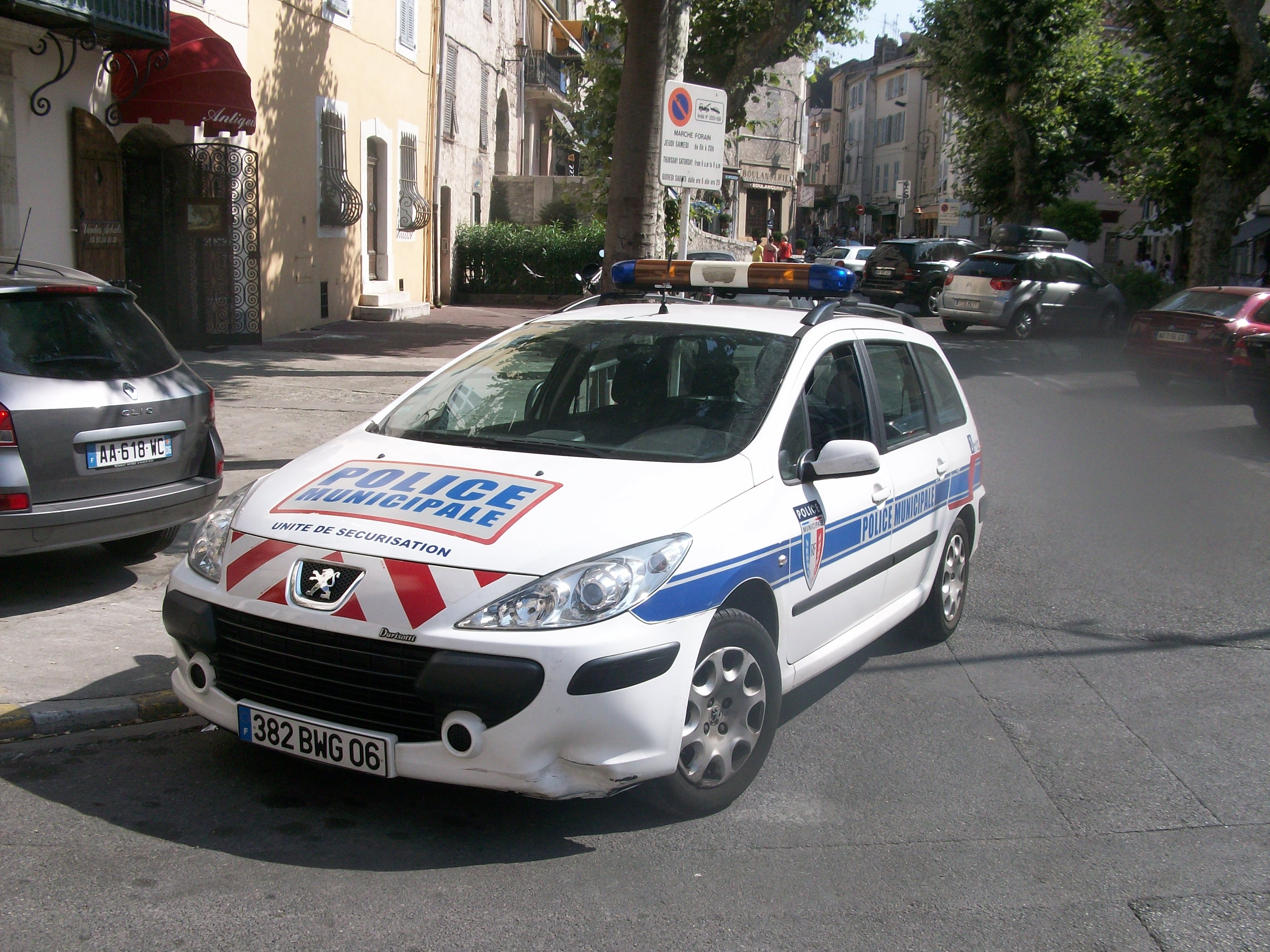 Voiture de la Police Municipale d'Antibes